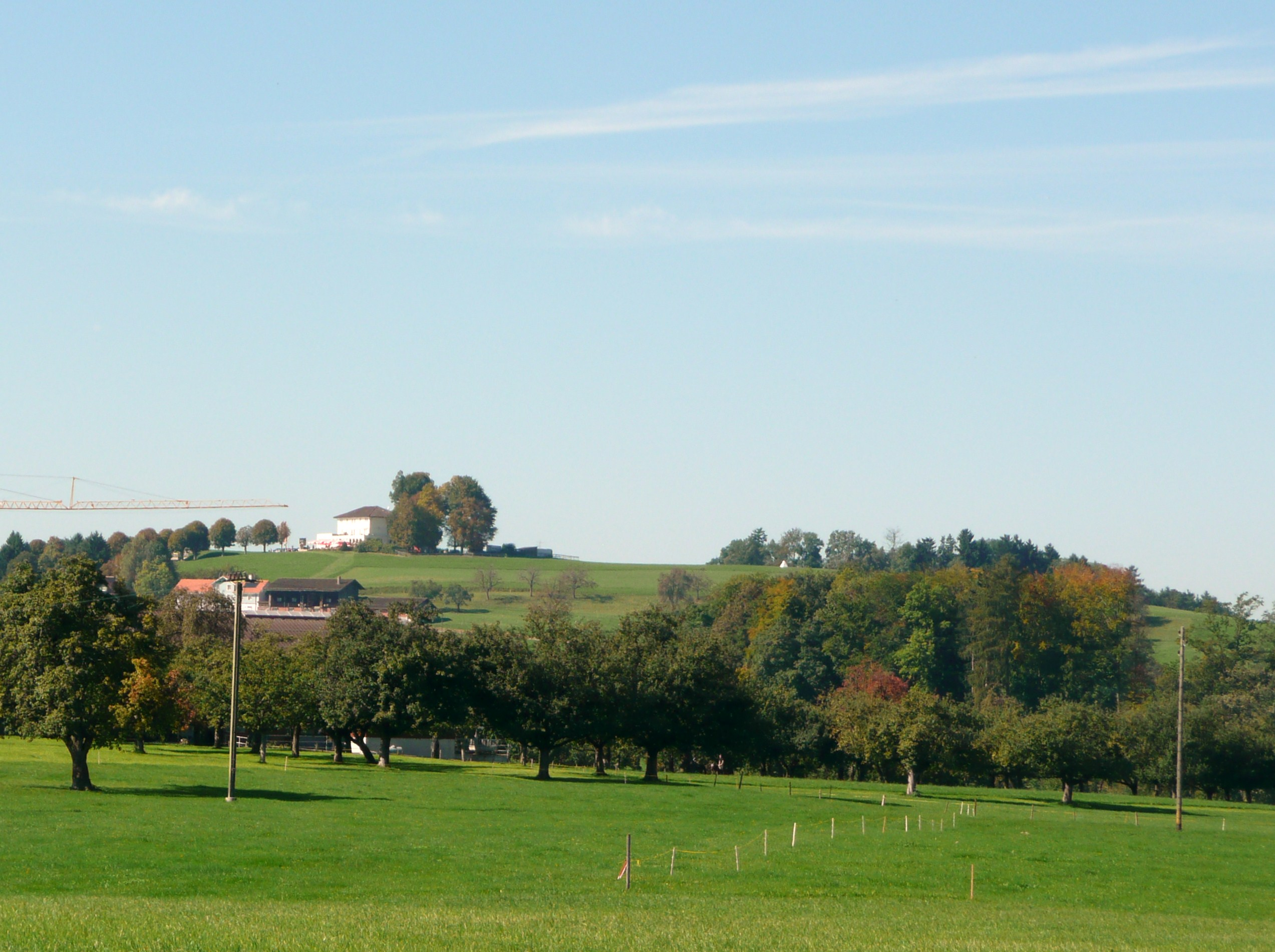 Der Nollen ist ein Hügel in der Gemeinde Wuppenau im Kanton Thurgau, Schweiz.